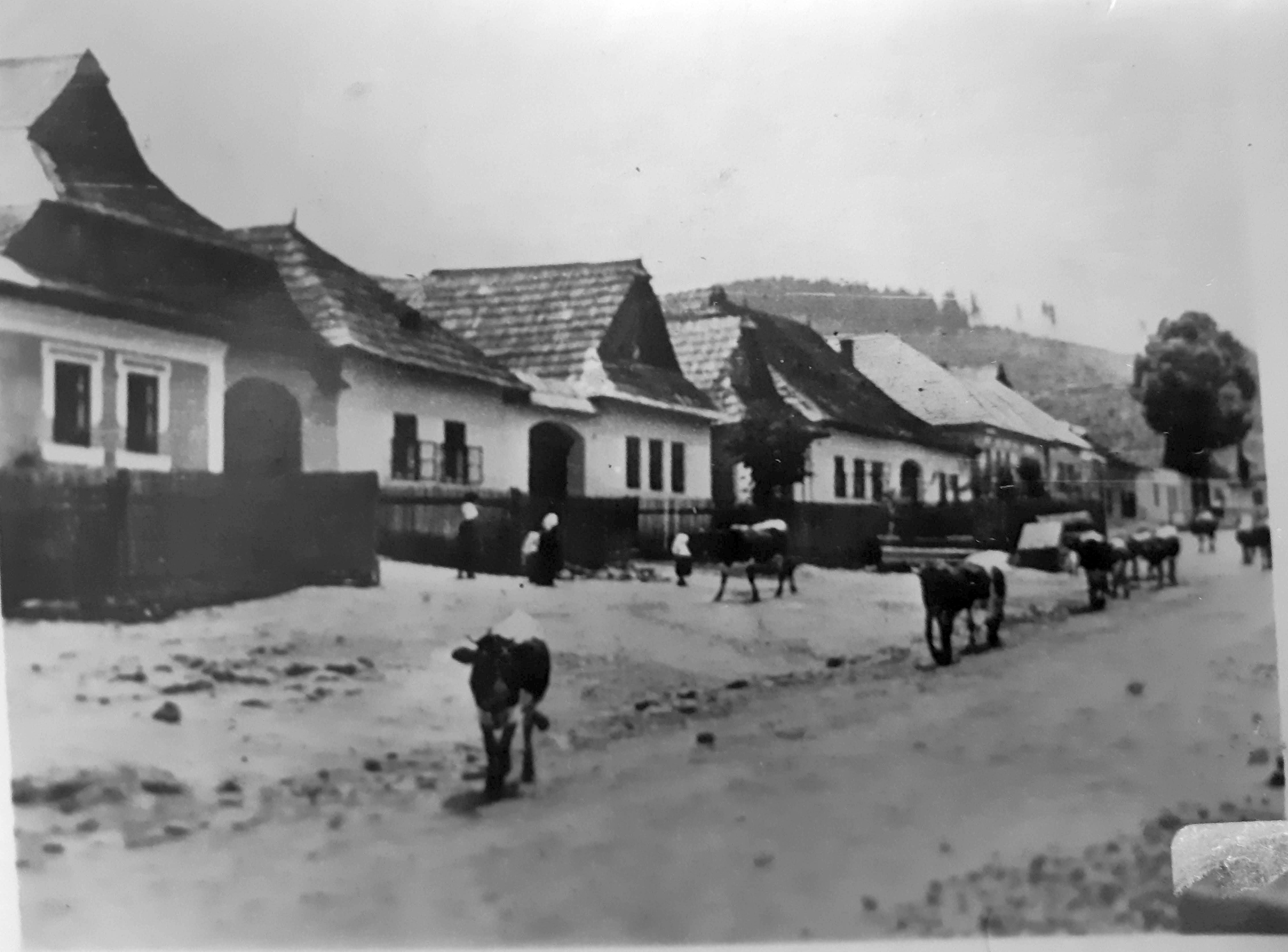 Hauptstraße von KleinLomnitz, Slovakei